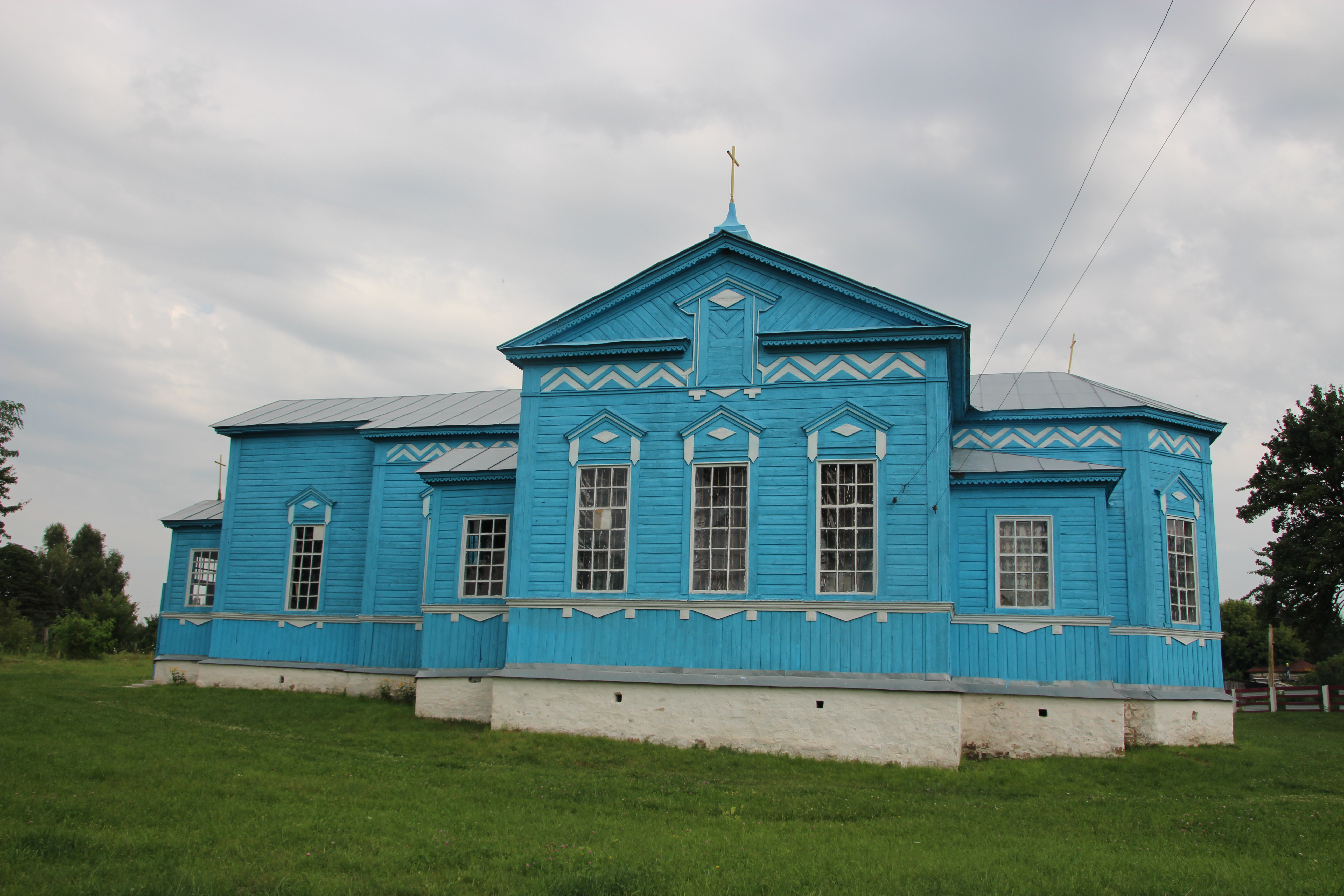 Петропавлівська церква, село Литвиновичі, вул. Садова, 7